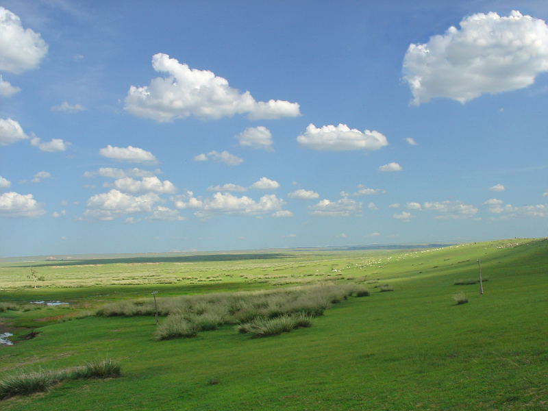 Wallpaper, Werbematerial für die Wikiversity, Auflösung 800 x 600 Pixel